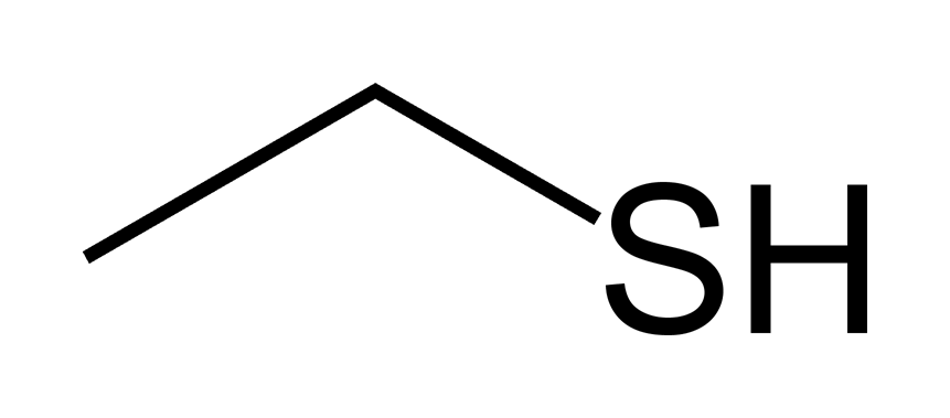 Ethanethiol-skeletal